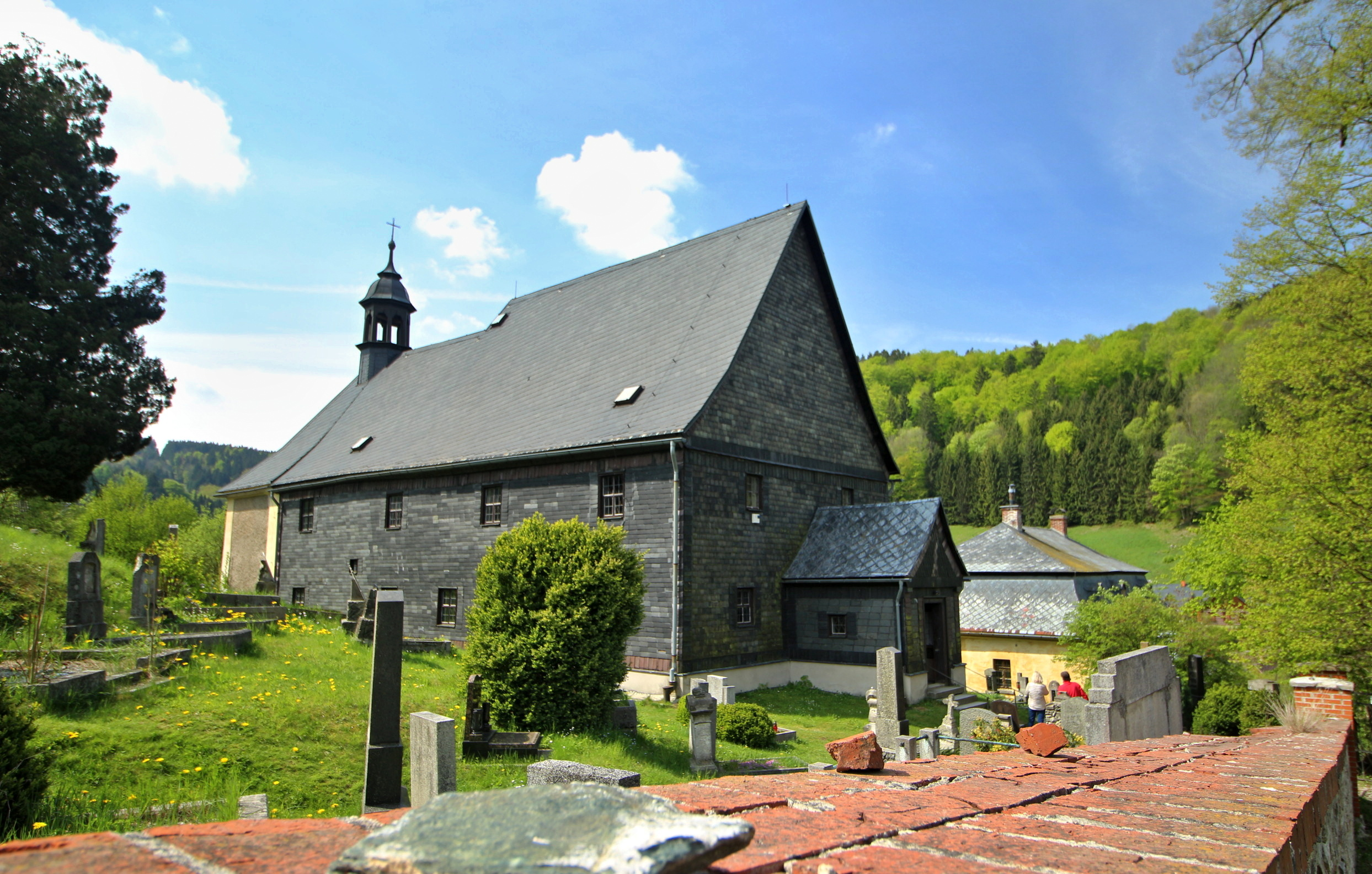 Kryštofovo údolí, hřbitovní kostel sv. Kryštofa s márničkou a farou